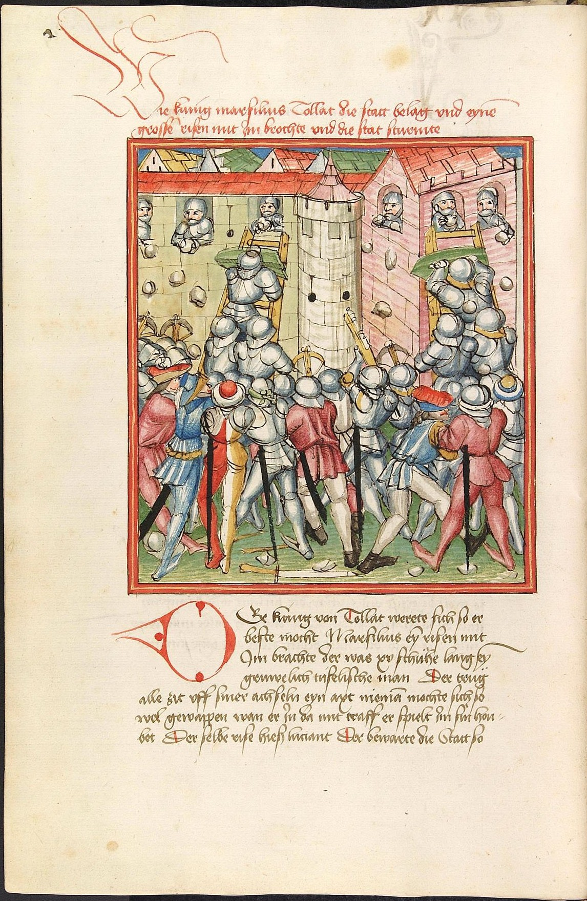 Codex Palatinus germanicus 152, Blatt 19v - Herpin - Die Ritter des Marsilius versuchen die Mauern von Tollat (Toledo) zu stürmen. Die Ritter der Stadt verteidigen die Mauern, indem sie Steine auf die Angreifer werfen.